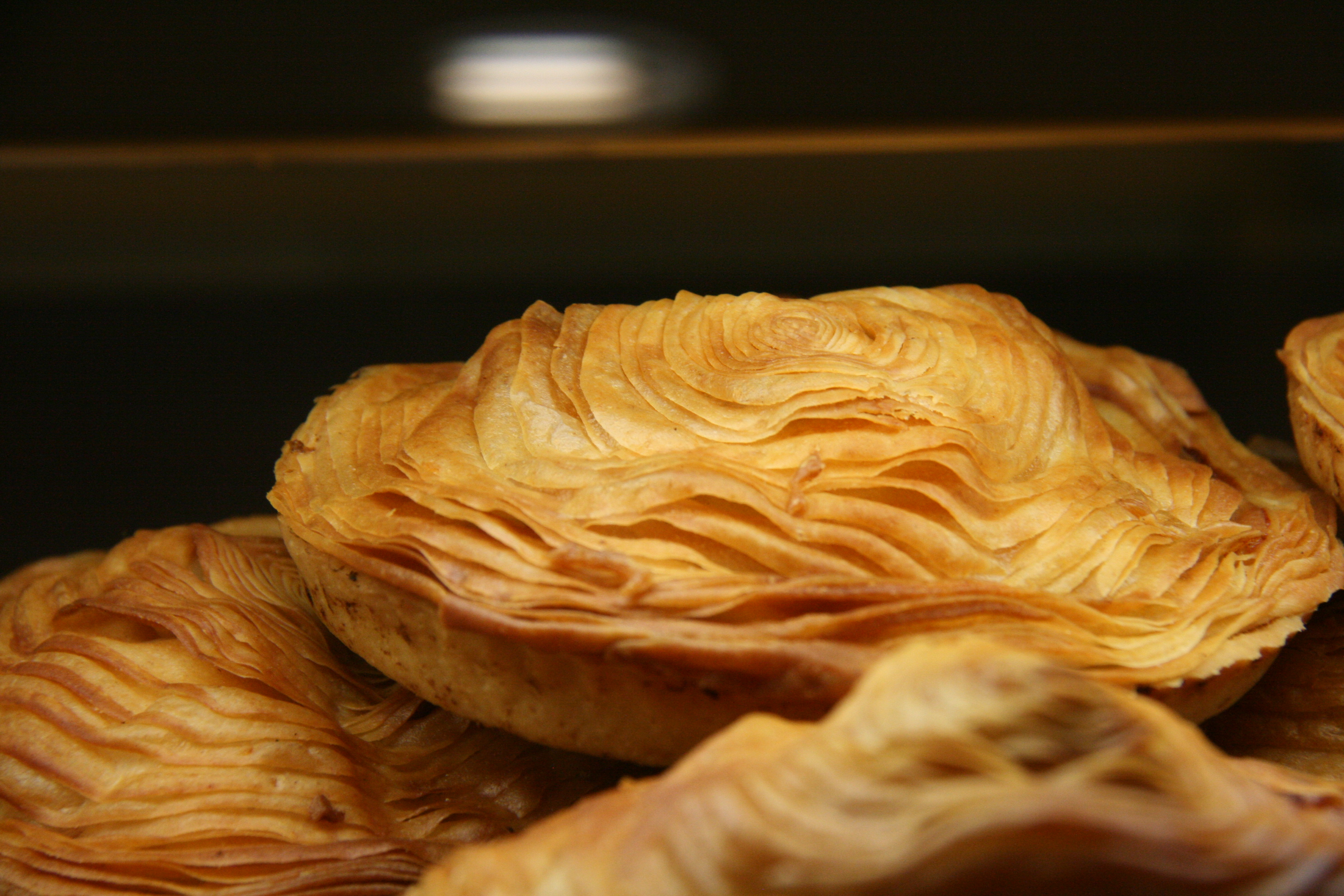 Fleischpastete aus Murcia